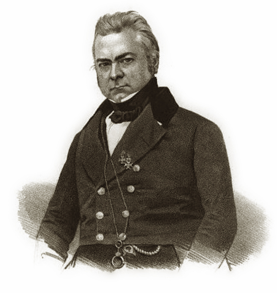 Eduard von Siebold (1801-1869), deutscher Mediziner. Lithographie nach Daguerrotypie